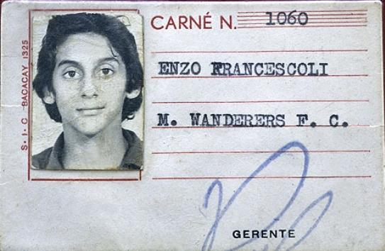 El chico Francescoli en foto 3 × 4 de su tarjeta de identificación de jugador juvenil Montevideo Wanderers, primer club de su carrera (1978—1982) y el único que defendió en su país natal.